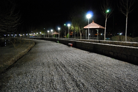 شده توسطشهرداری محترم /بارگزاری علی اکبری